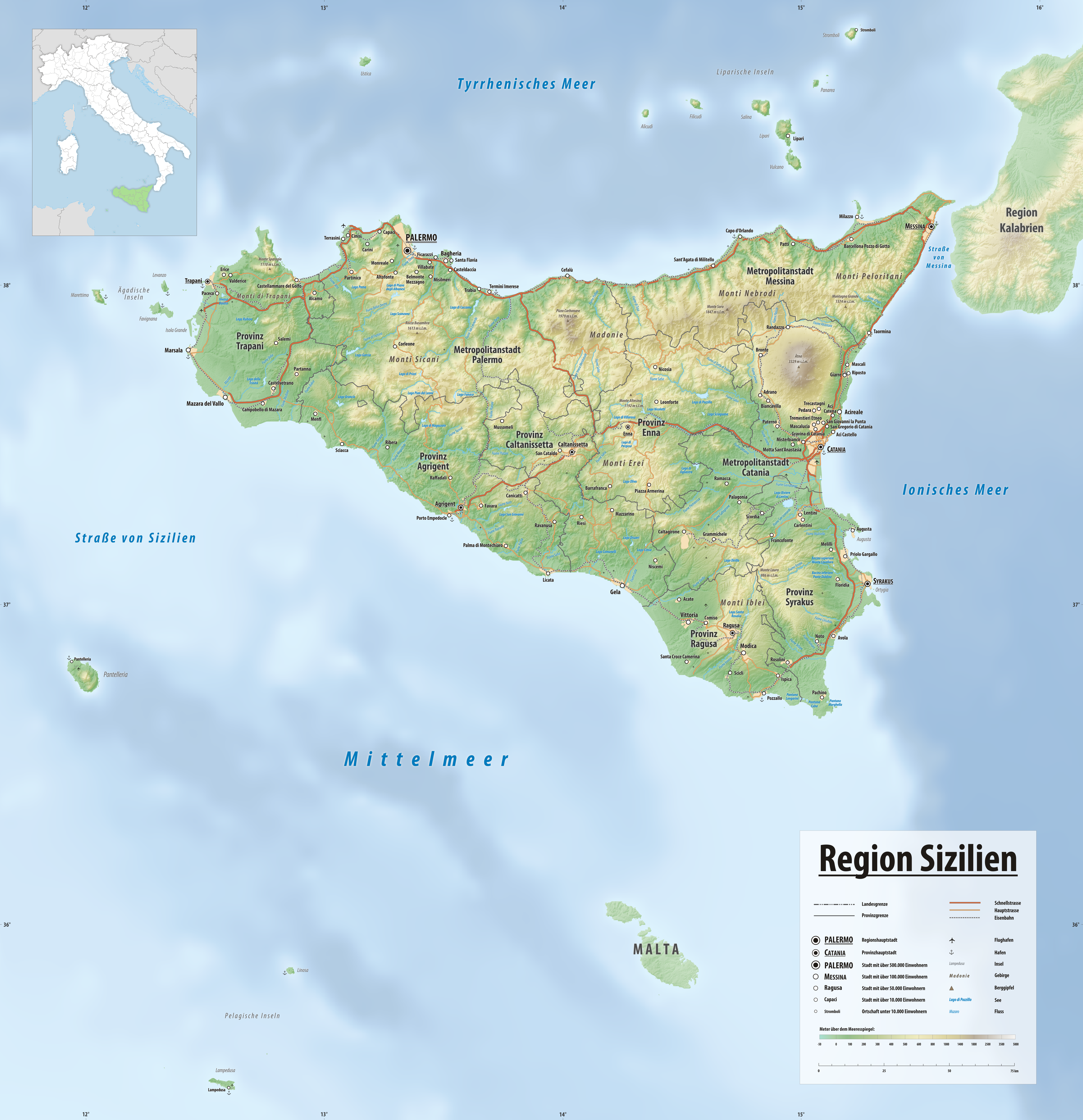 Reliefkarte der Region Sizilien Topographischer Hintergrund: NASA Shuttle Radar Topography Mission (public domain). SRTM3 v.2.